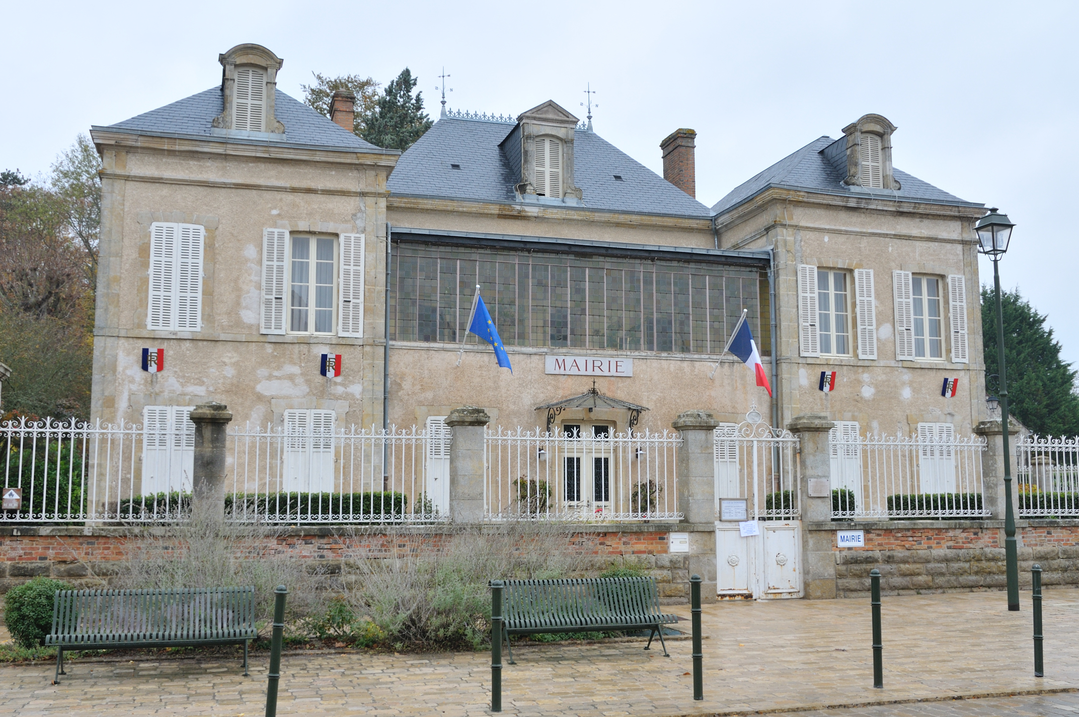 Mairie, Donnery, Loiret, France